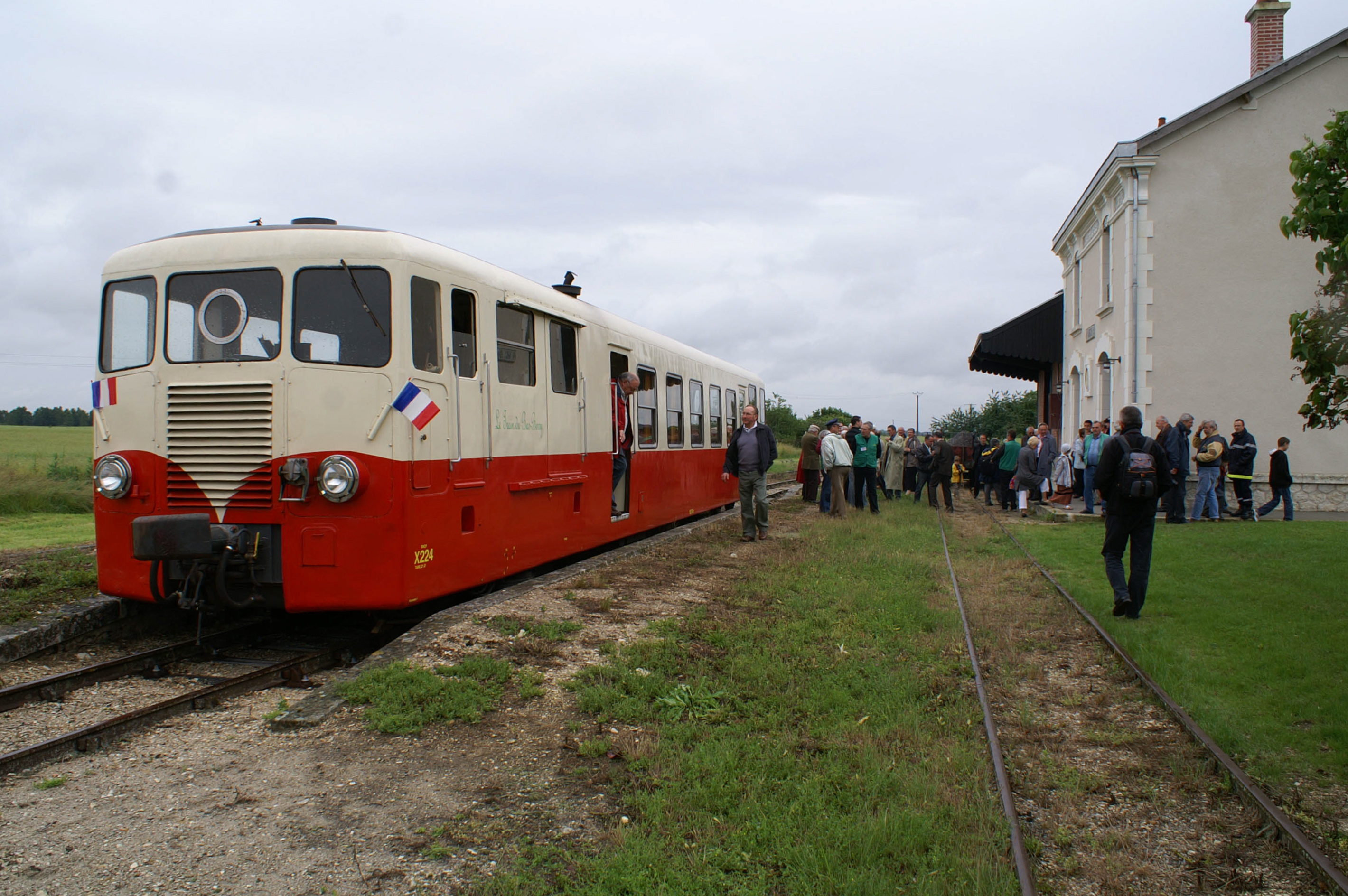 Gare d'Argy lors de l'inauguration de la gare rénovée le 19 juin 2010, en présence de l'autorail Verney du chemin de fer touristique et historique Train du Bas-Berry.